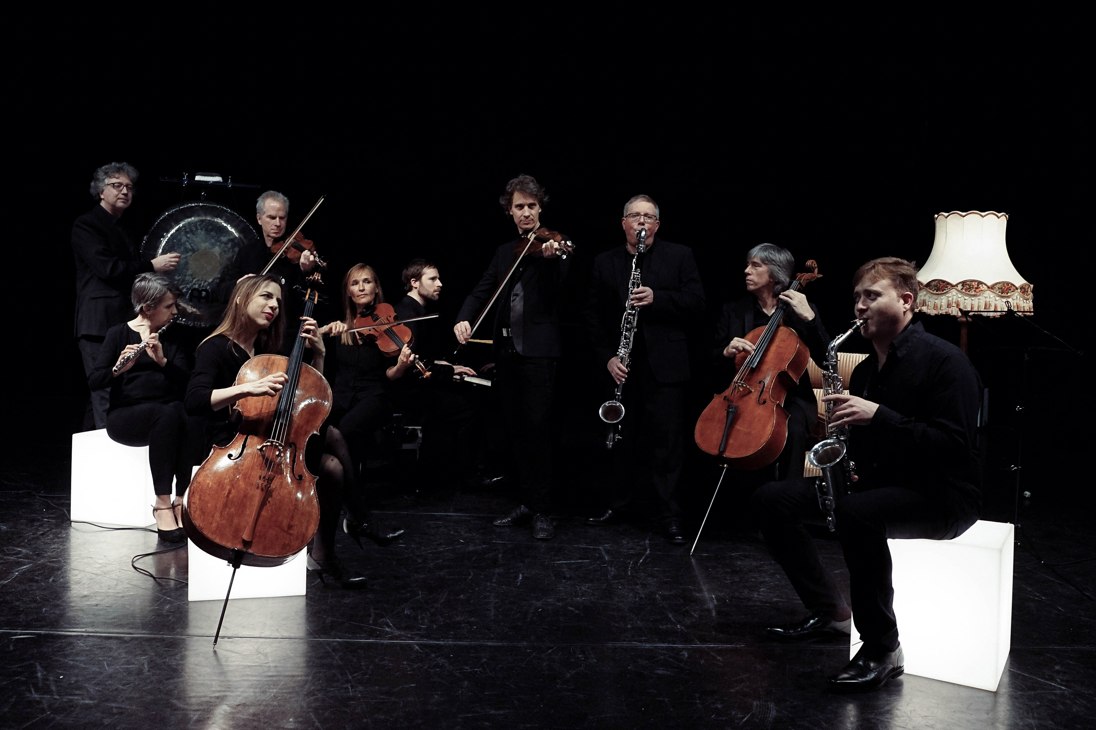 Les musiciens de United Instruments of Lucilin